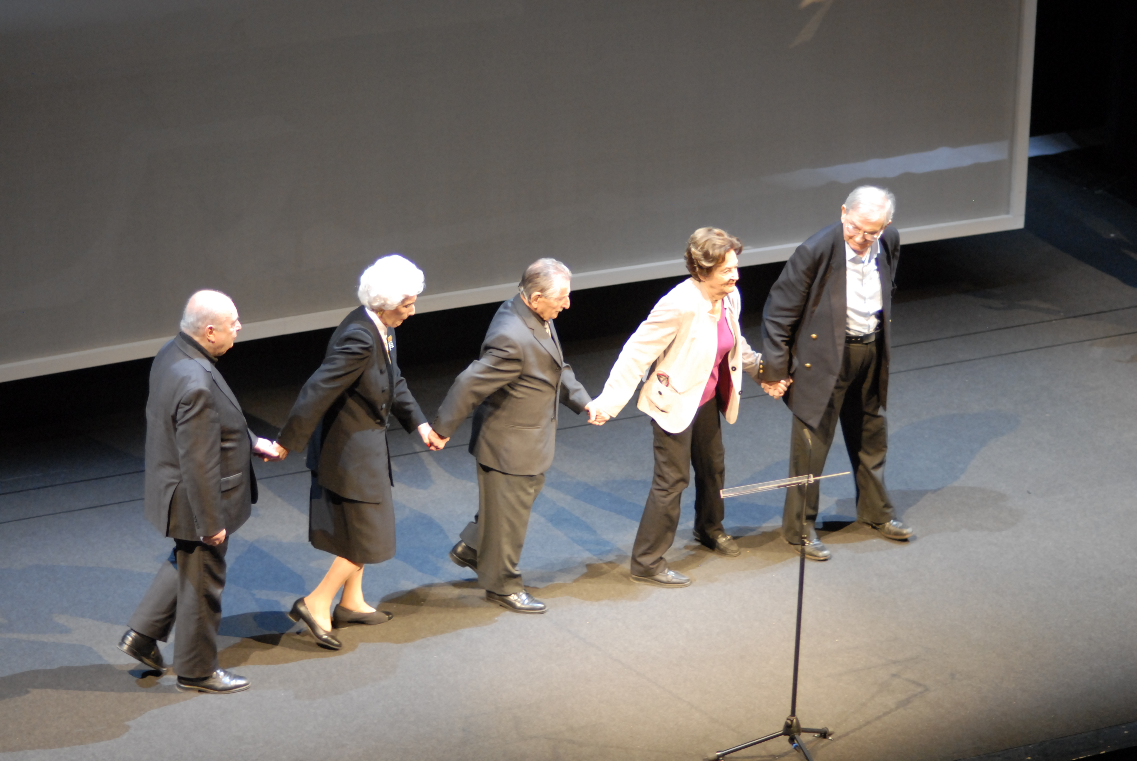 Rudolf Gelbard, Suzanne-Lucienne Rabinovici, Marko Feingold, Lucia Heilman, Ari Rath auf der Bühne des Wiener Burgtheaters